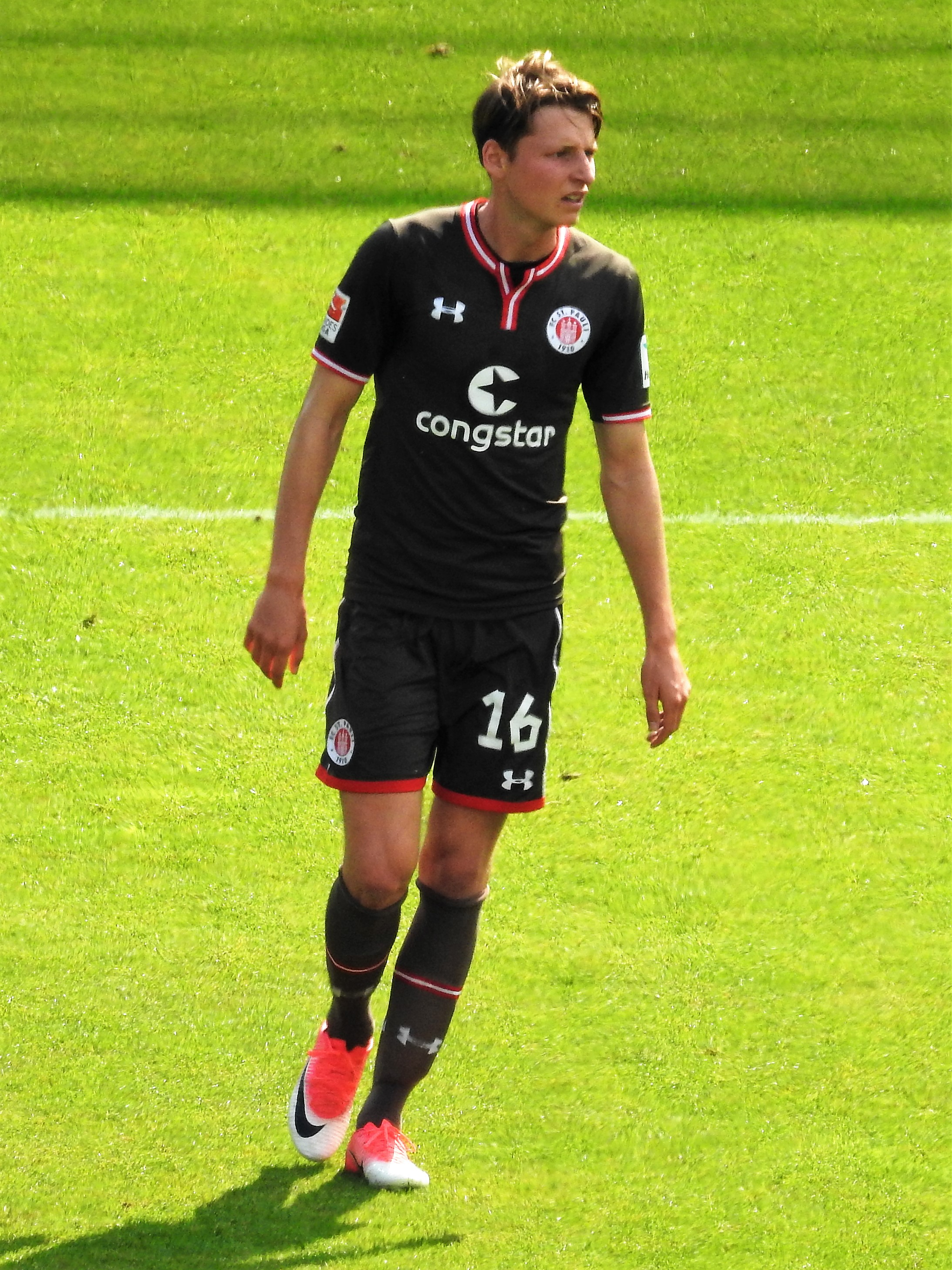 Marc Hornschuh beim FC St.Pauli